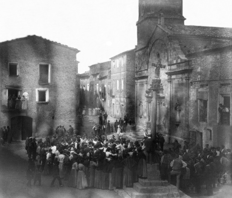 Imatge